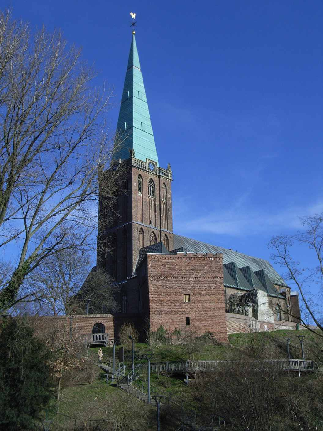 St.Gangolf auf dem Heinsberger Burg- und Kirchberg